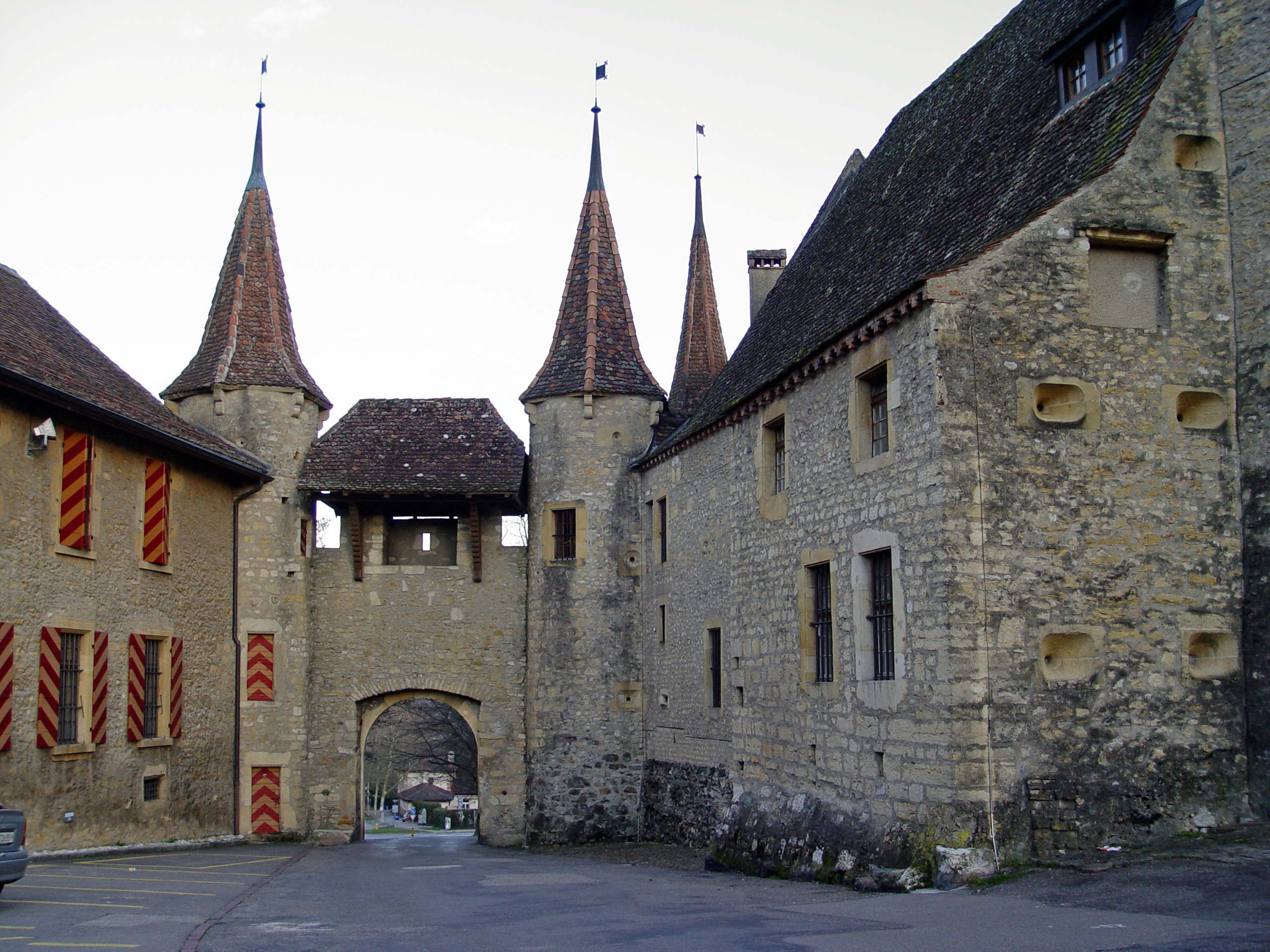 Colombier, Schloss